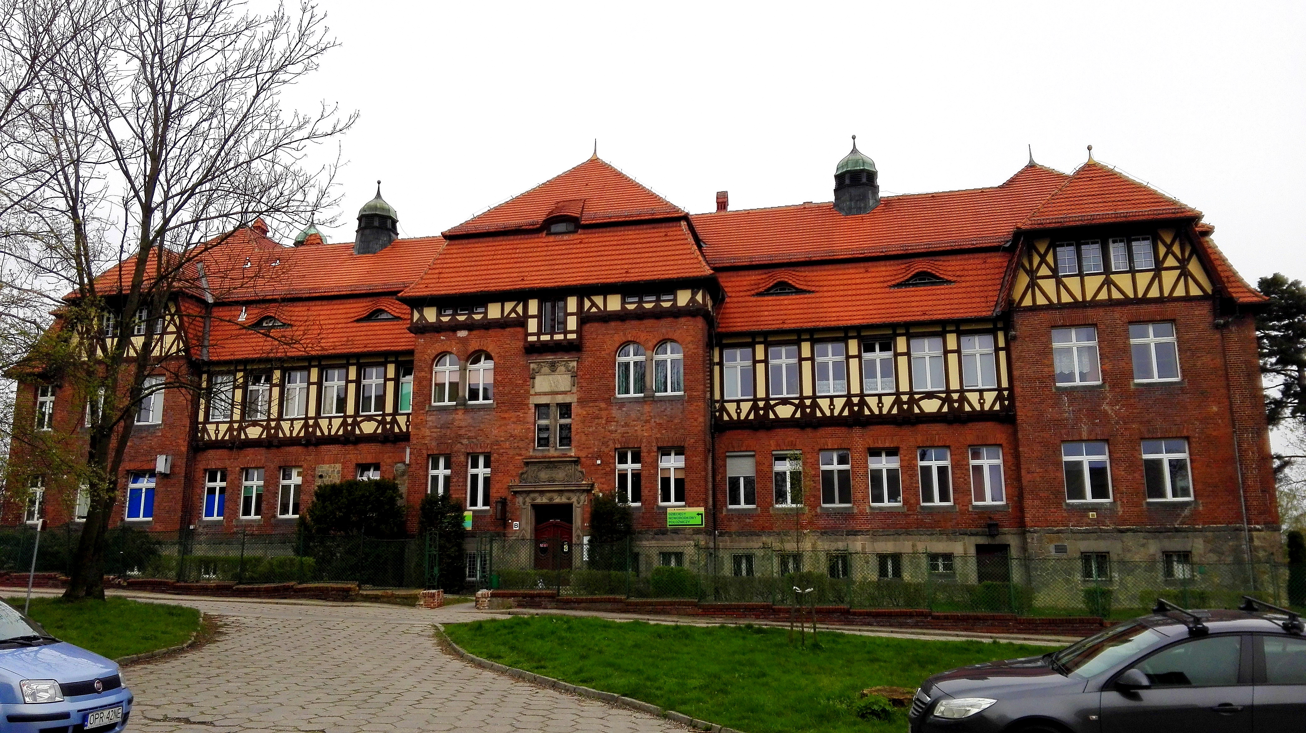 Prudnik, szpital powiatowy